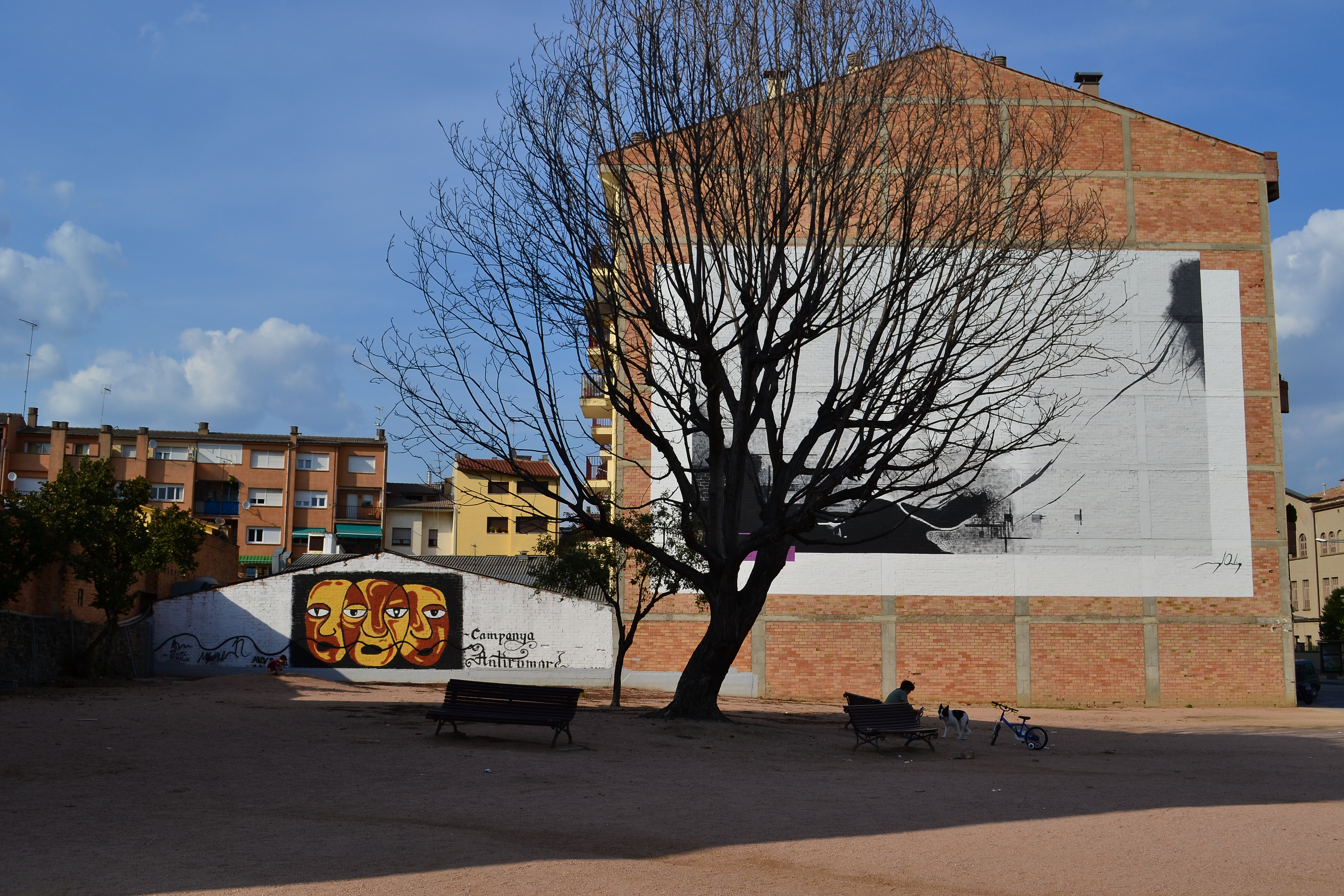 Mural artístic pintat pel col·lectiu de Teatre Anti-rumors de Vic